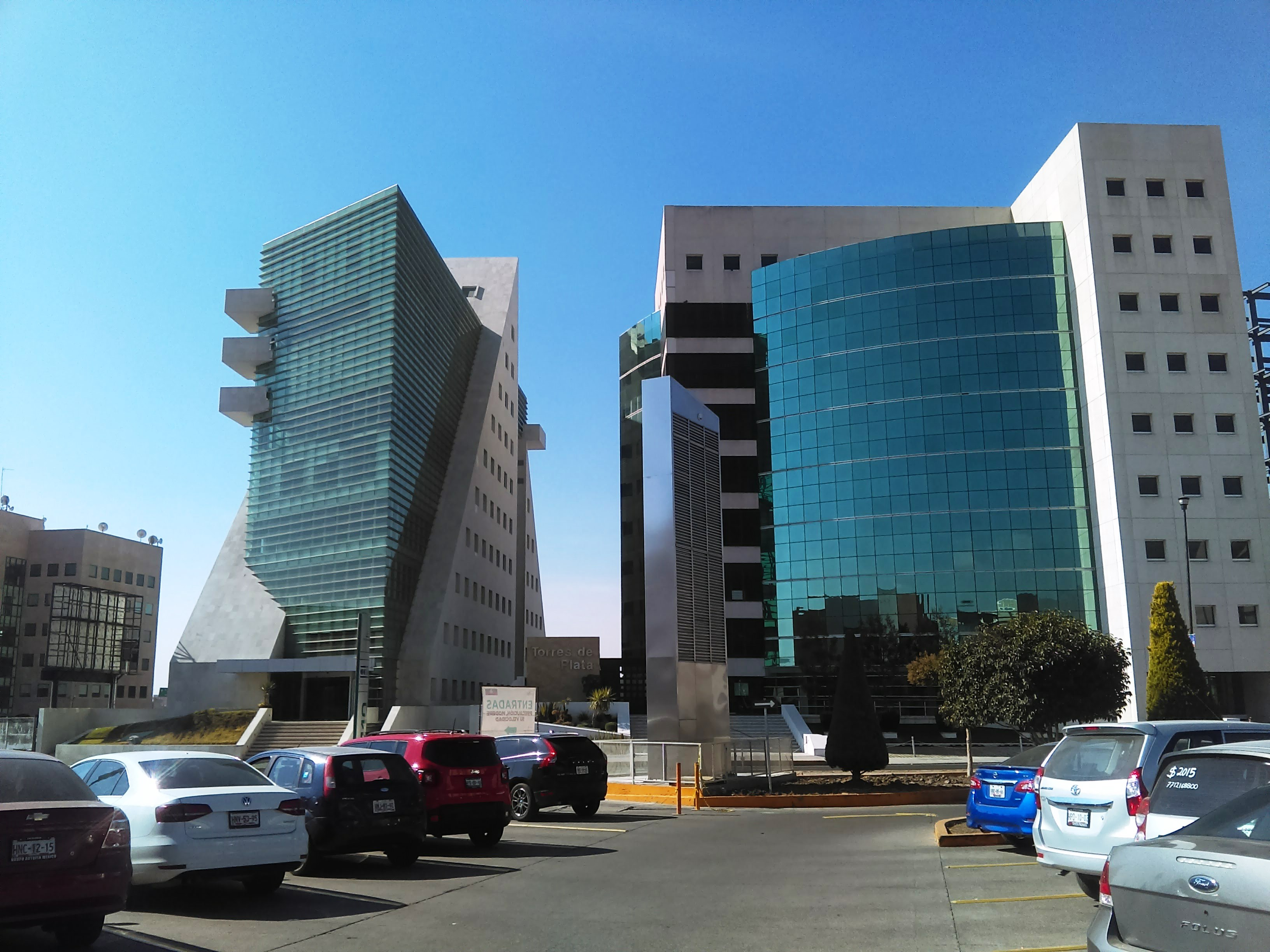 Zona Plateada in Pachuca, Mexico.